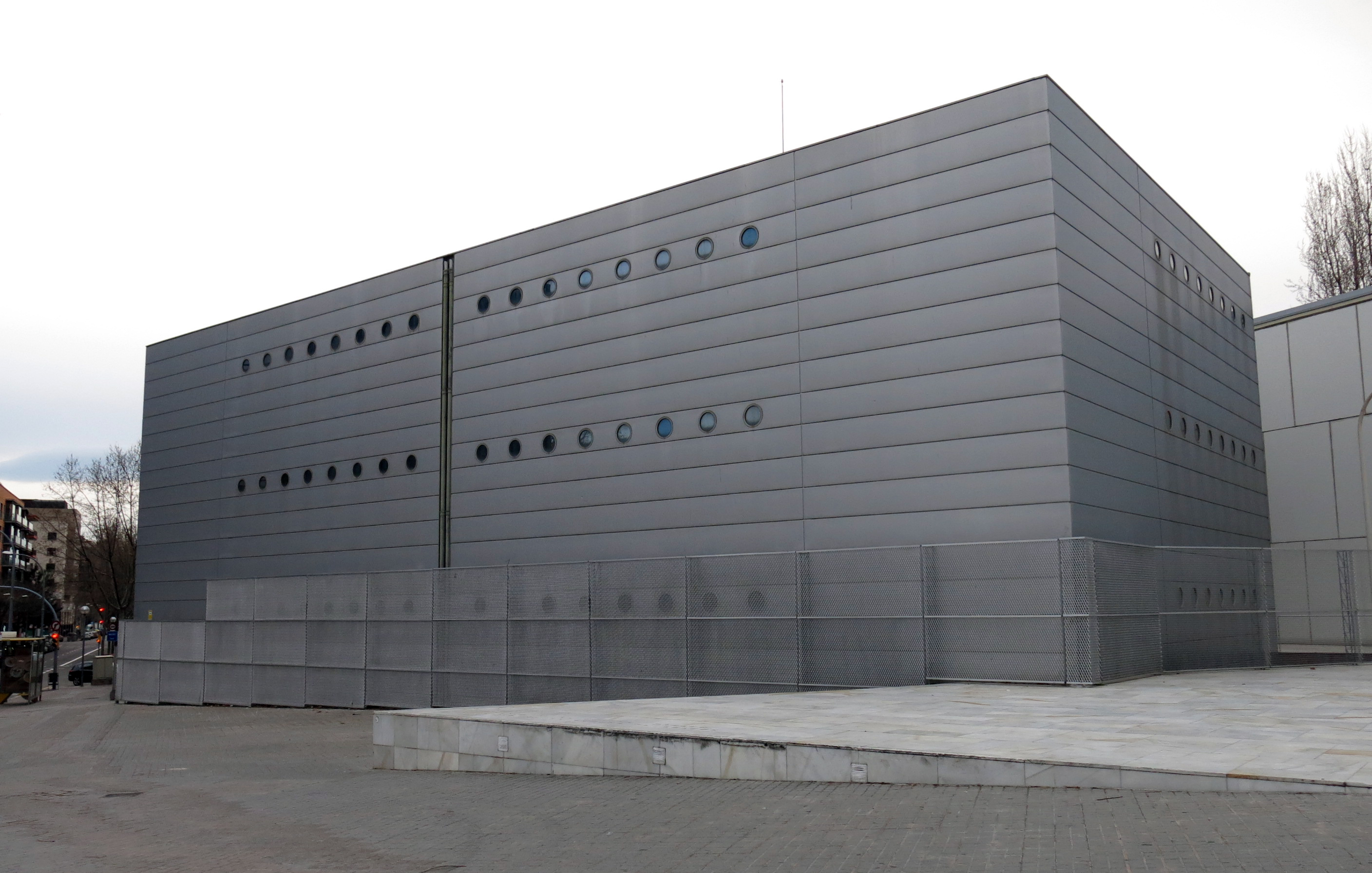 Arxiu de la Corona d'Aragó